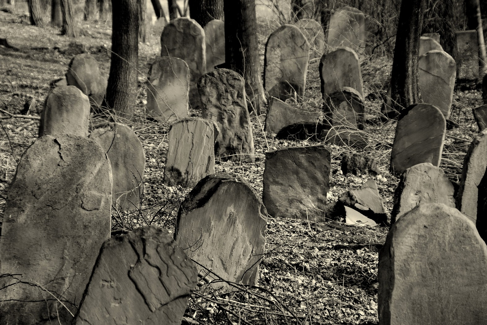 cmentarz żydowski Nowy Żmigród, Nowy Żmigród